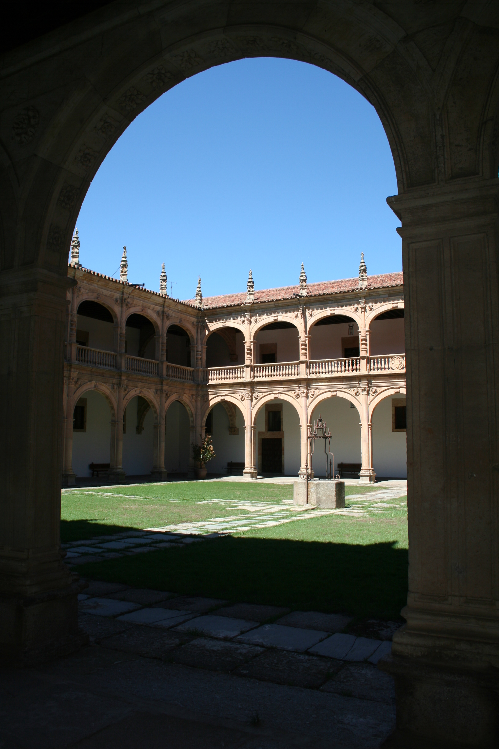 Kloostergang van het Colegio Mayor de Santiago el Zebedeo